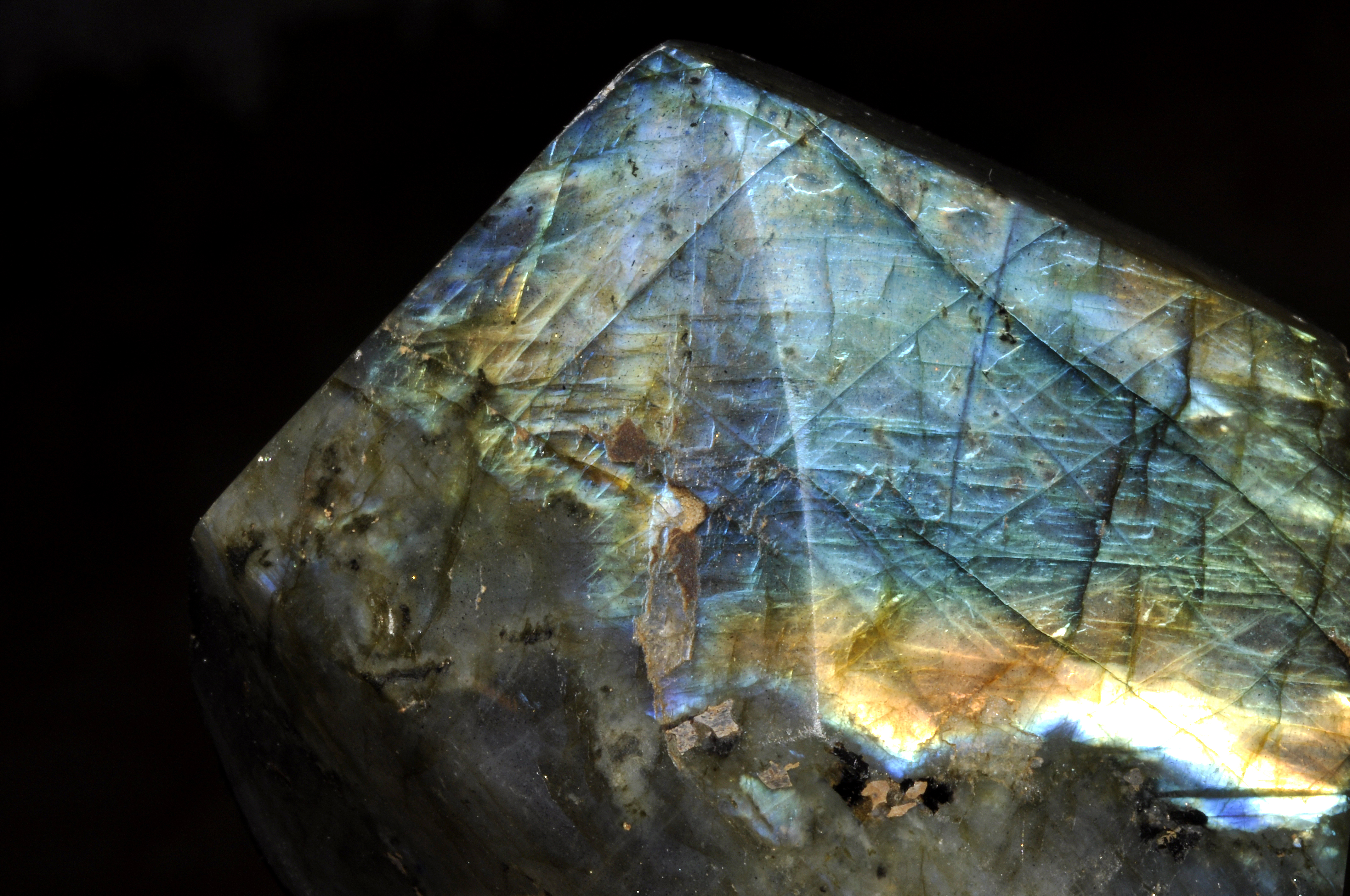 bloc de labradorite polie